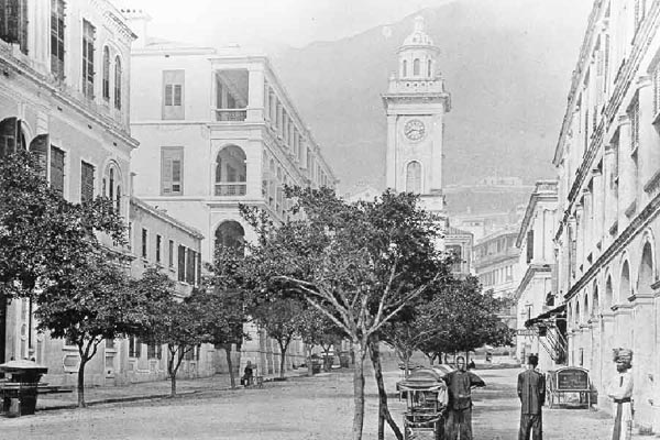 Pedder_Street, Hong Kong